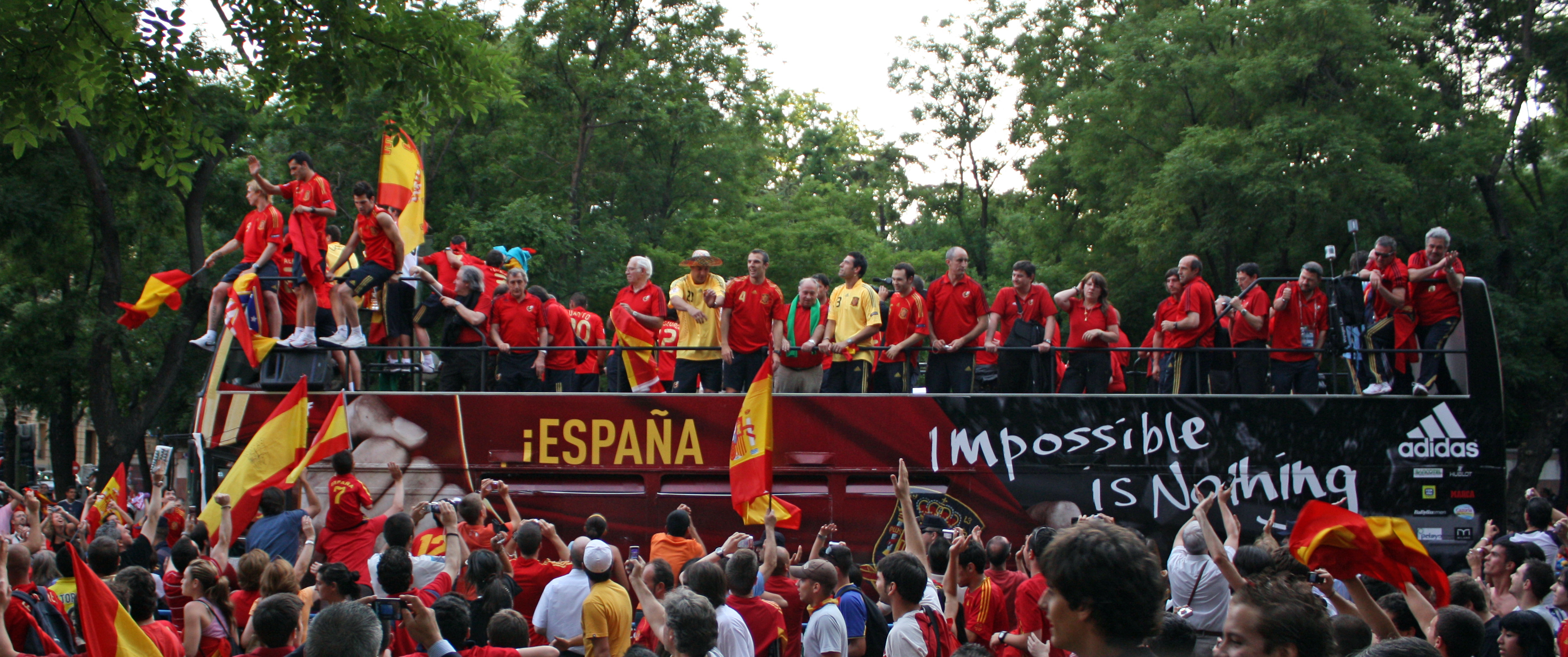 La Selección nacional de fútbol de España Celebra en Madrid la Eurocopa 2008.